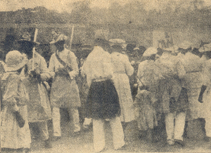 Polyanthéa em homengaem ao tri-centenário da creação do município de Parnahyba Pag.109